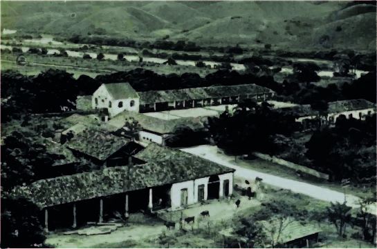 Fazenda do Pocinho, Vassouras, Rio de Janeiro, Brasil: vista aérea.